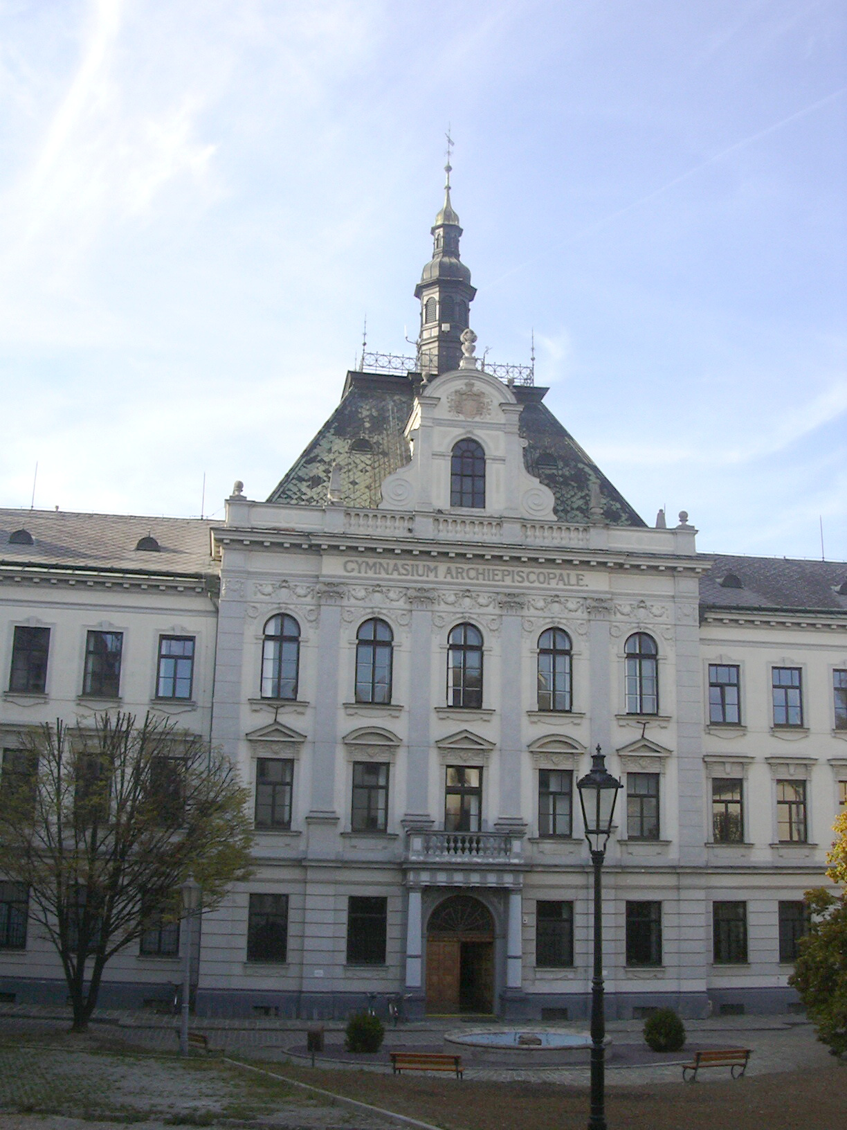 Arcibiskupské gymnázium Kroměříž